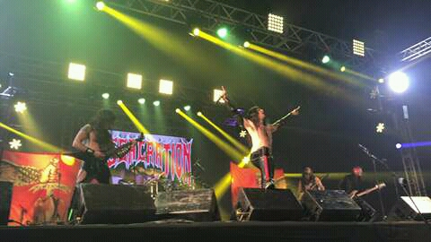 Massacration em show em Fortaleza em 2017